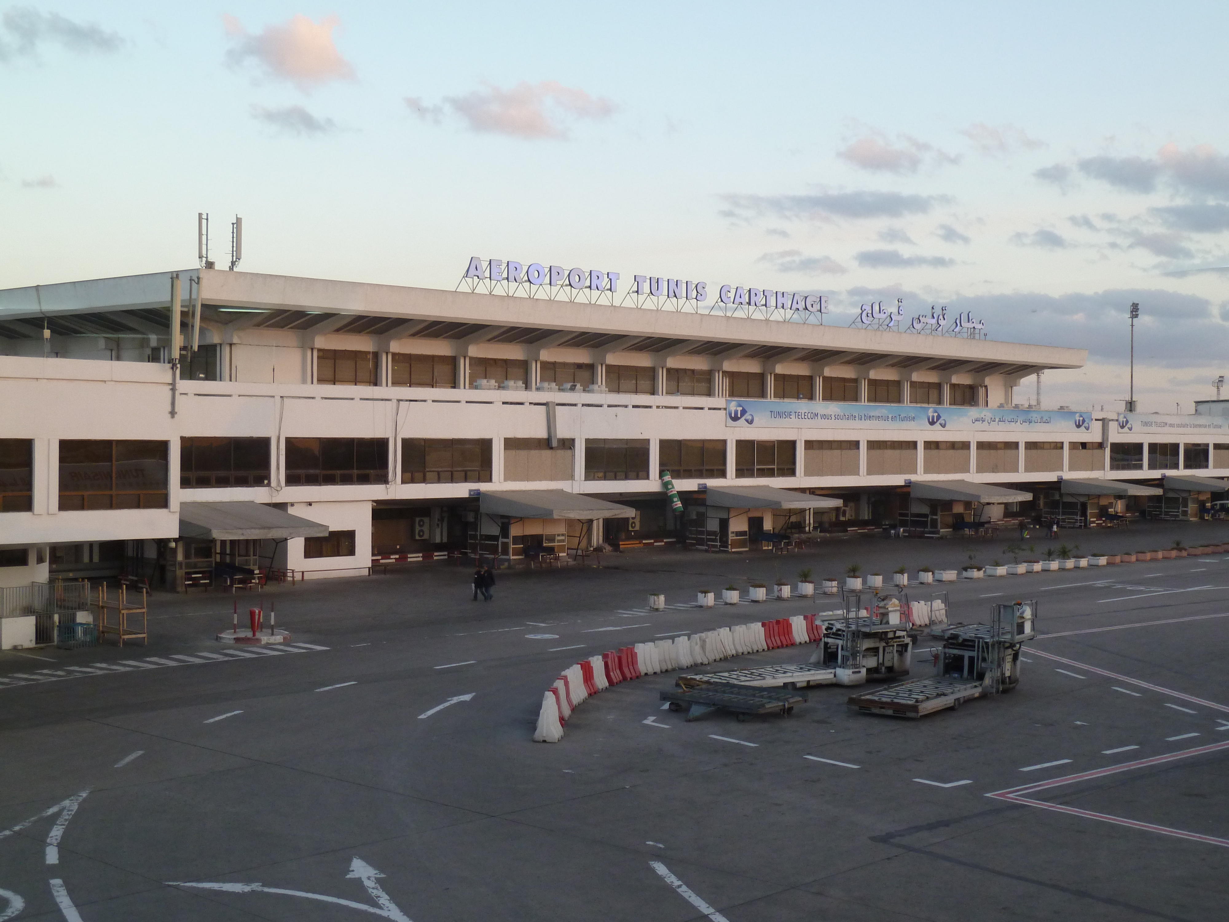 L'aéroport de Tunis Carthage